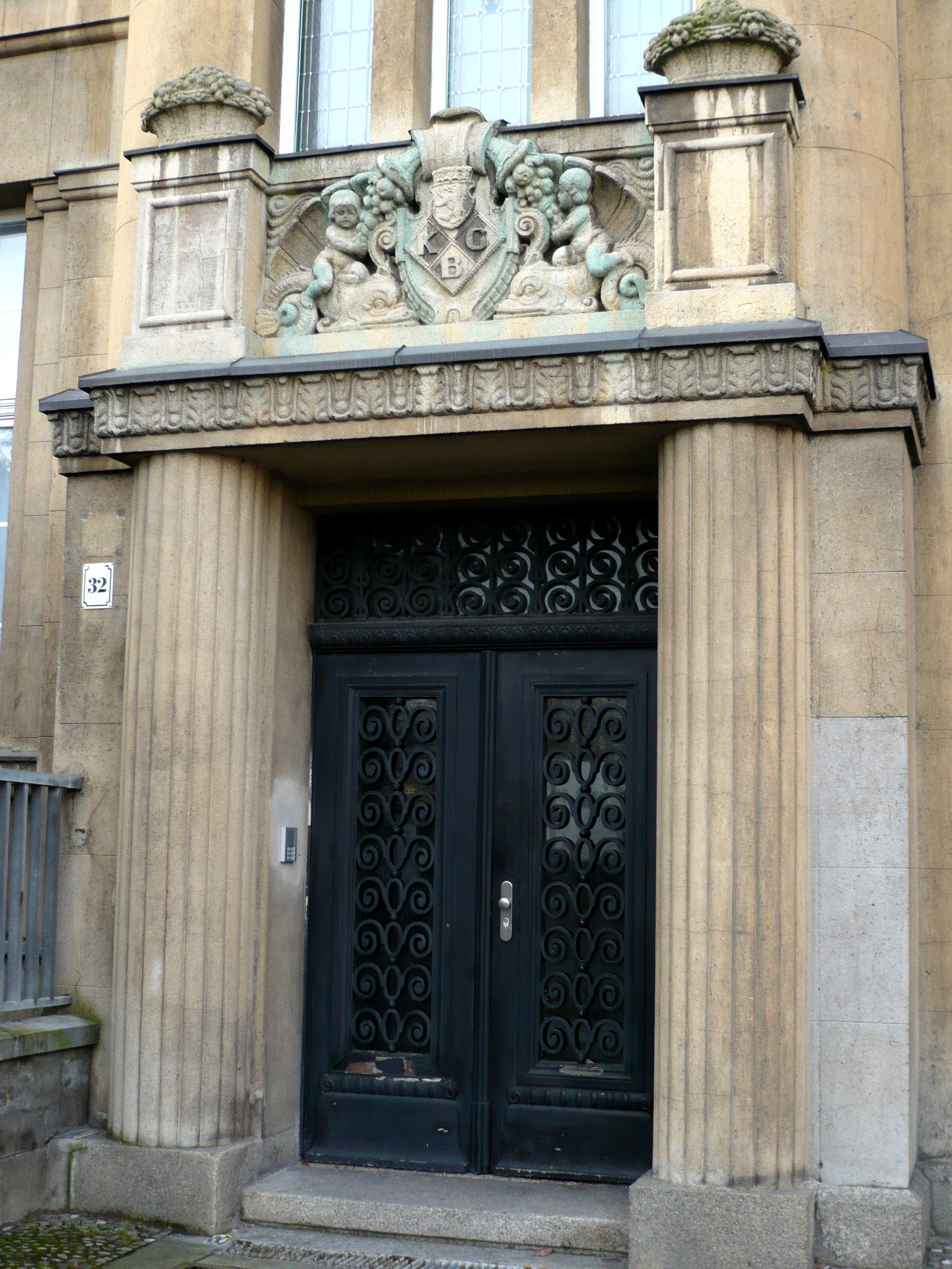 Nebeneingang des Verwaltungsgebäudes der Berliner Konsumgenossenschaft, mit "Firmenzeichen" KGB